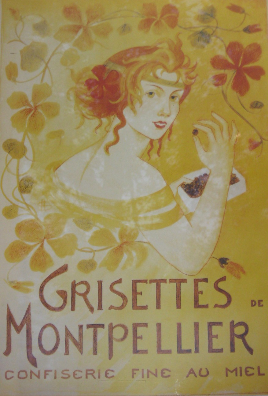 Ancienne affiche publicitaire pour la confiserie des grisettes de Montpellier